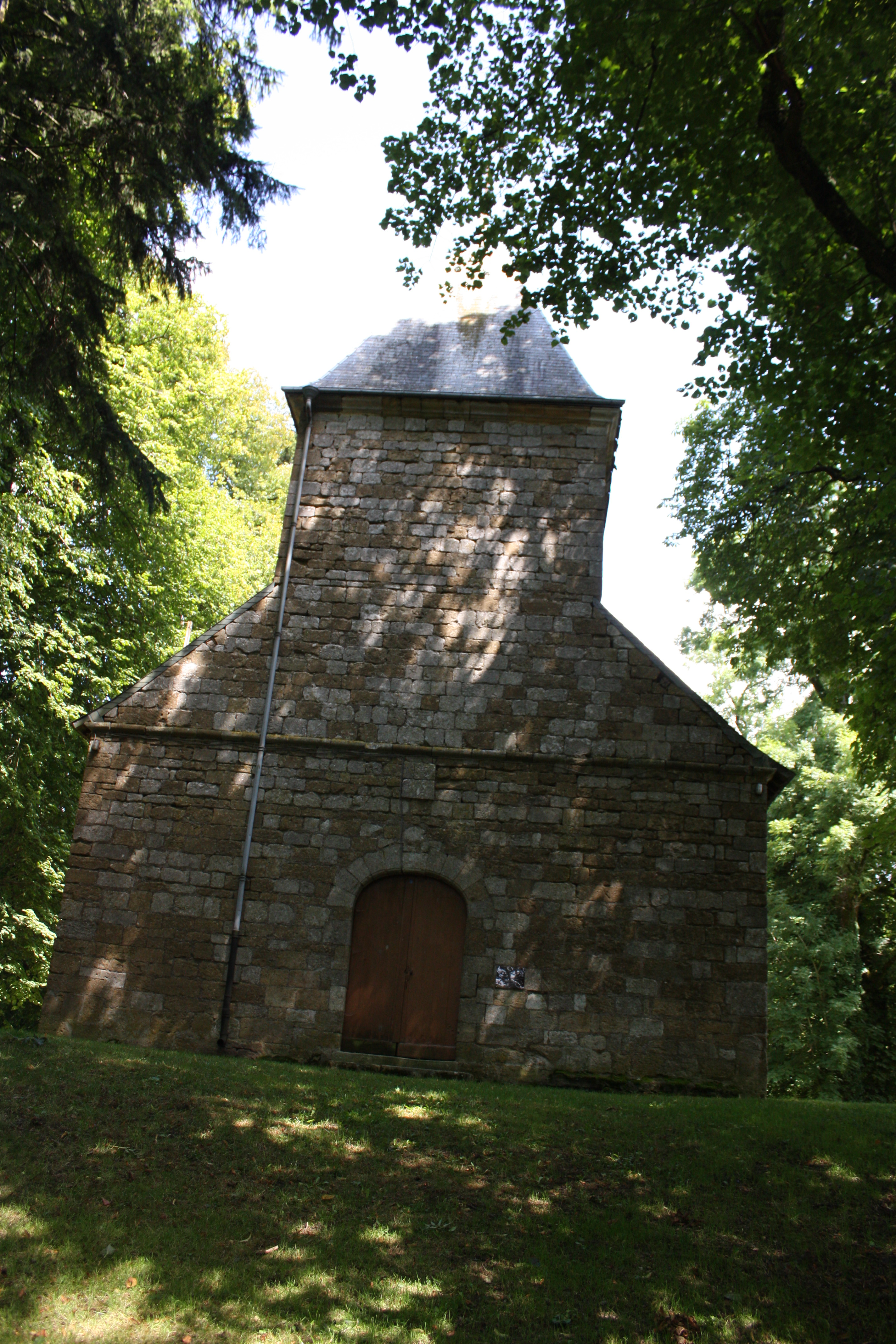 Village Ardennais